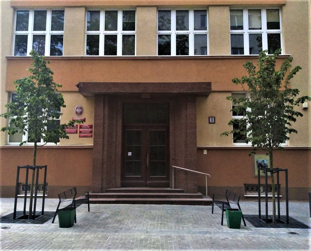 budynek przy ul. Lindleya 3/5 w Łodzi, Uniwersytet Łódzki